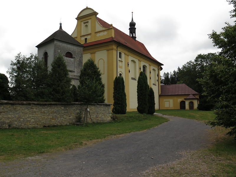 Kostel svatého Jakuba Většího, severozápadní část obce, Nové Hrady (okres Ústí nad Orlicí).